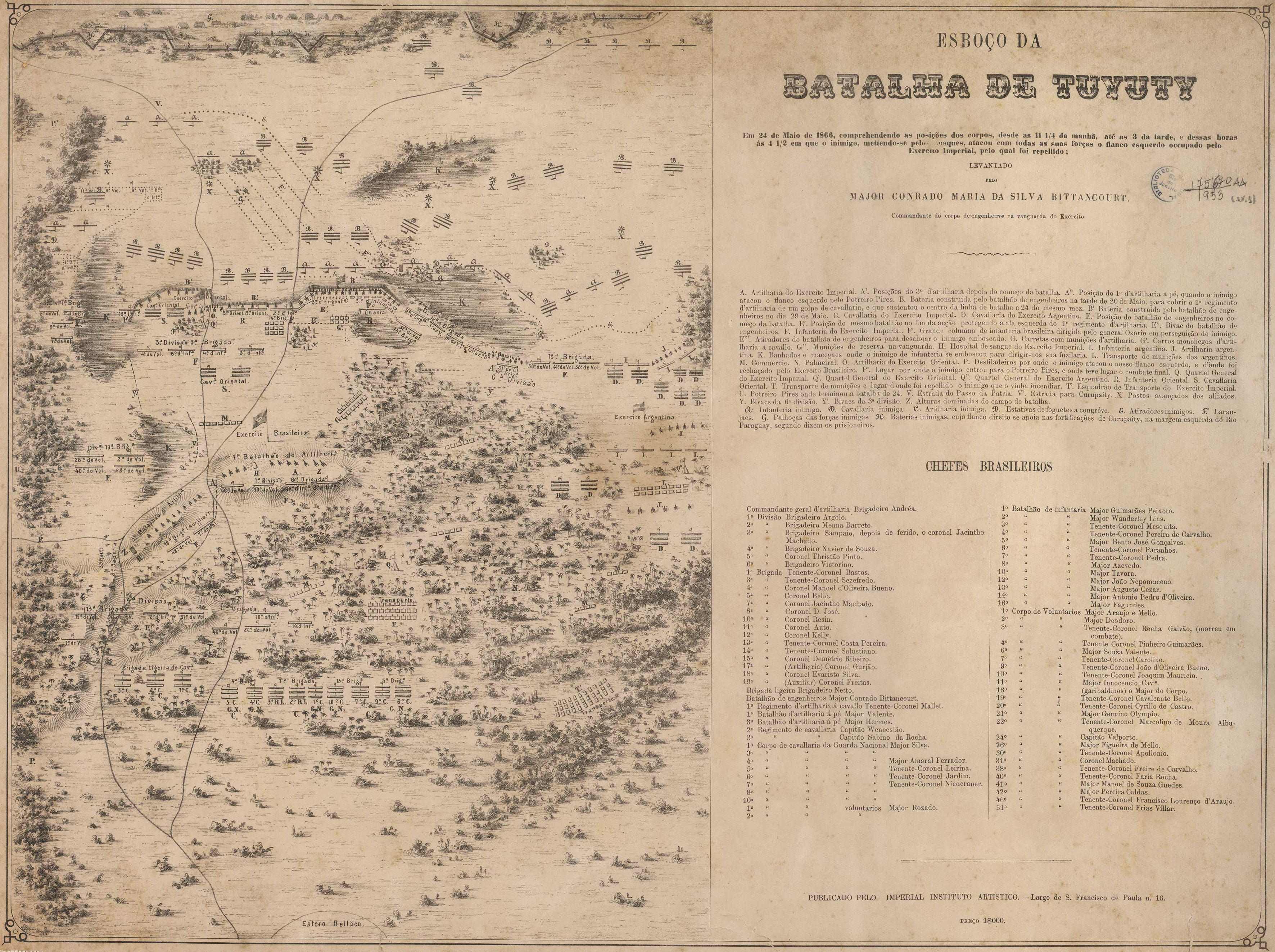 Esboço da batalha de Tuyuty [Cartográfico] : em 24 de maio de 1866, comprehendendo as posições dos corpos, desde 11 1/4 da manhã, até as 3 da tarde, e dessas horas as 4 1/2 em que o inimigo, mettendo-se pelos [bosques], atacou com todas as suas forças o flanco esquerdo occupado pelo Exercito Imperial, pelo qual foi repellido.